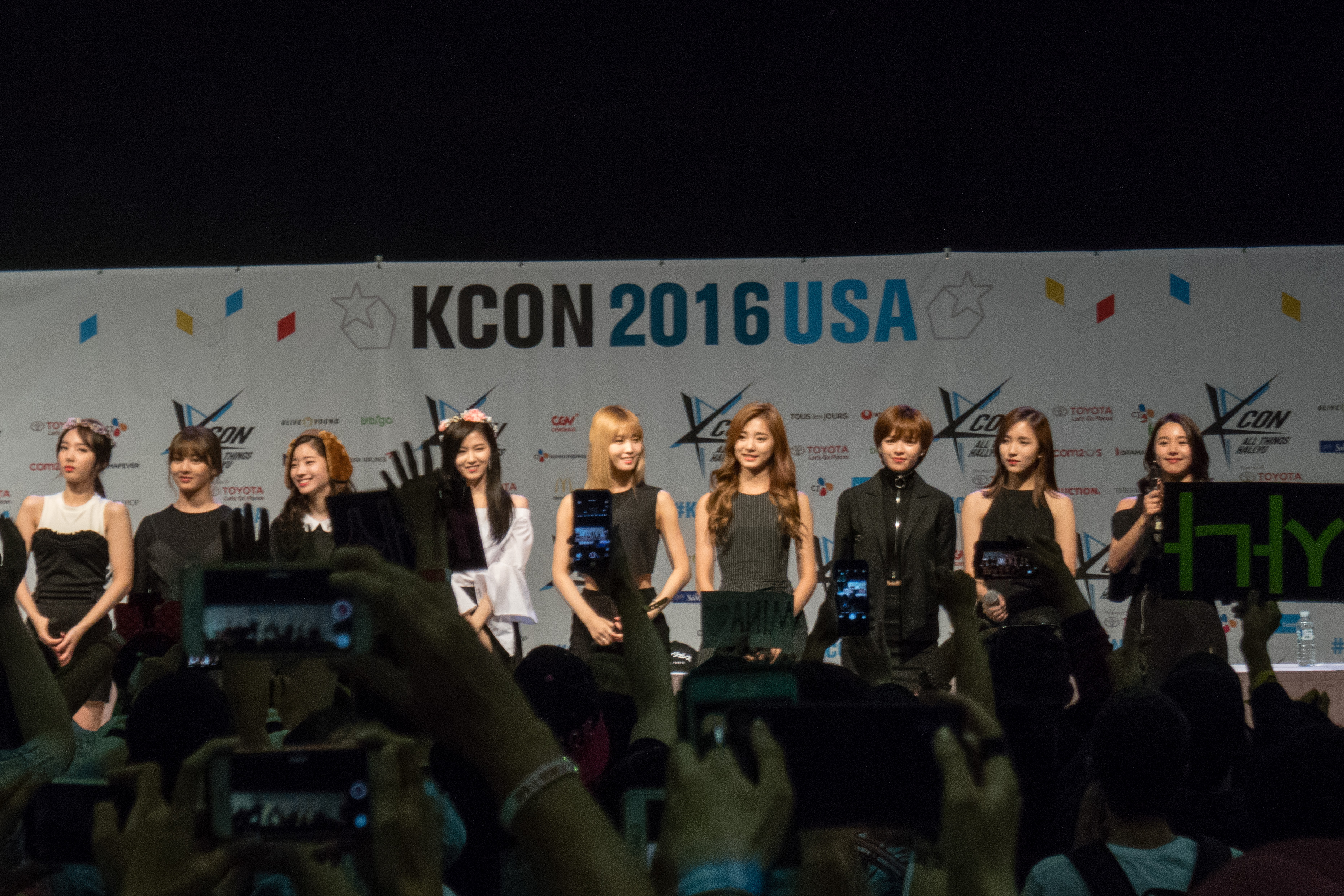 20160731-P1010369 KCON 2016 LA